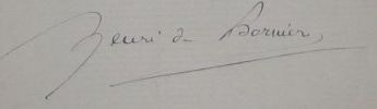 Signature d'Henri de Bornier